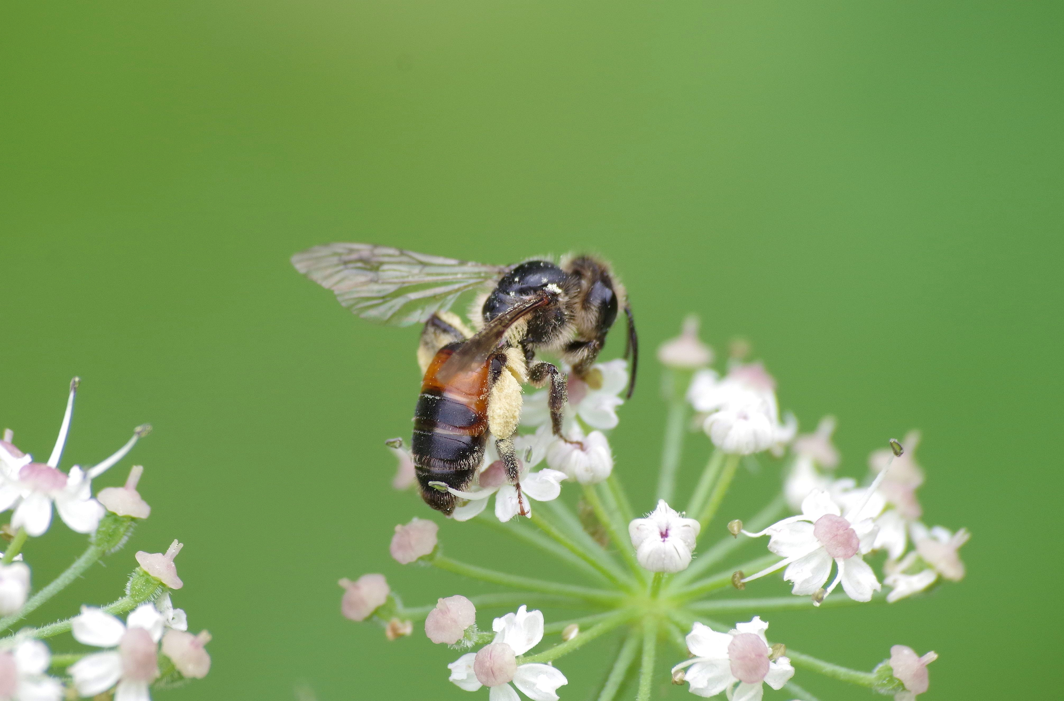 Kriticky ohrožený druh včely sedící na své preferované živné rostlině.